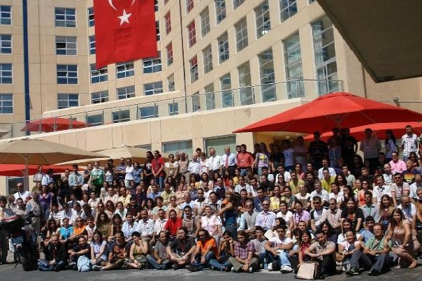 UAK 2006 Katılımcıları